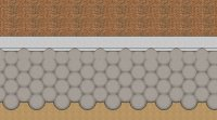 Het schematische vooraanzicht bij vertikale grondinjectie